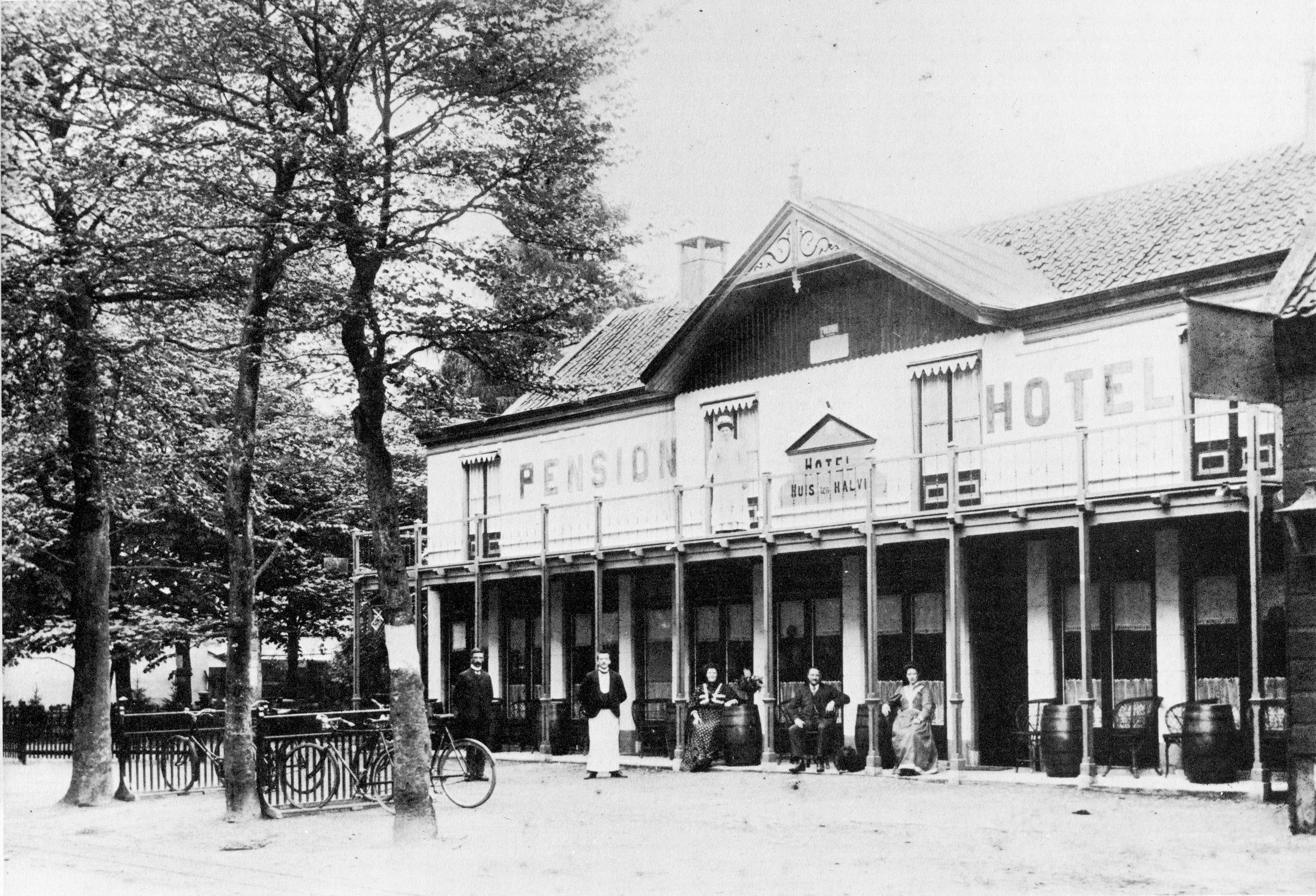 Hotel-pension Huis ten Halve in Soesterberg